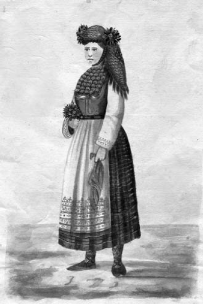 Ношња из Врчина и Гроцке.